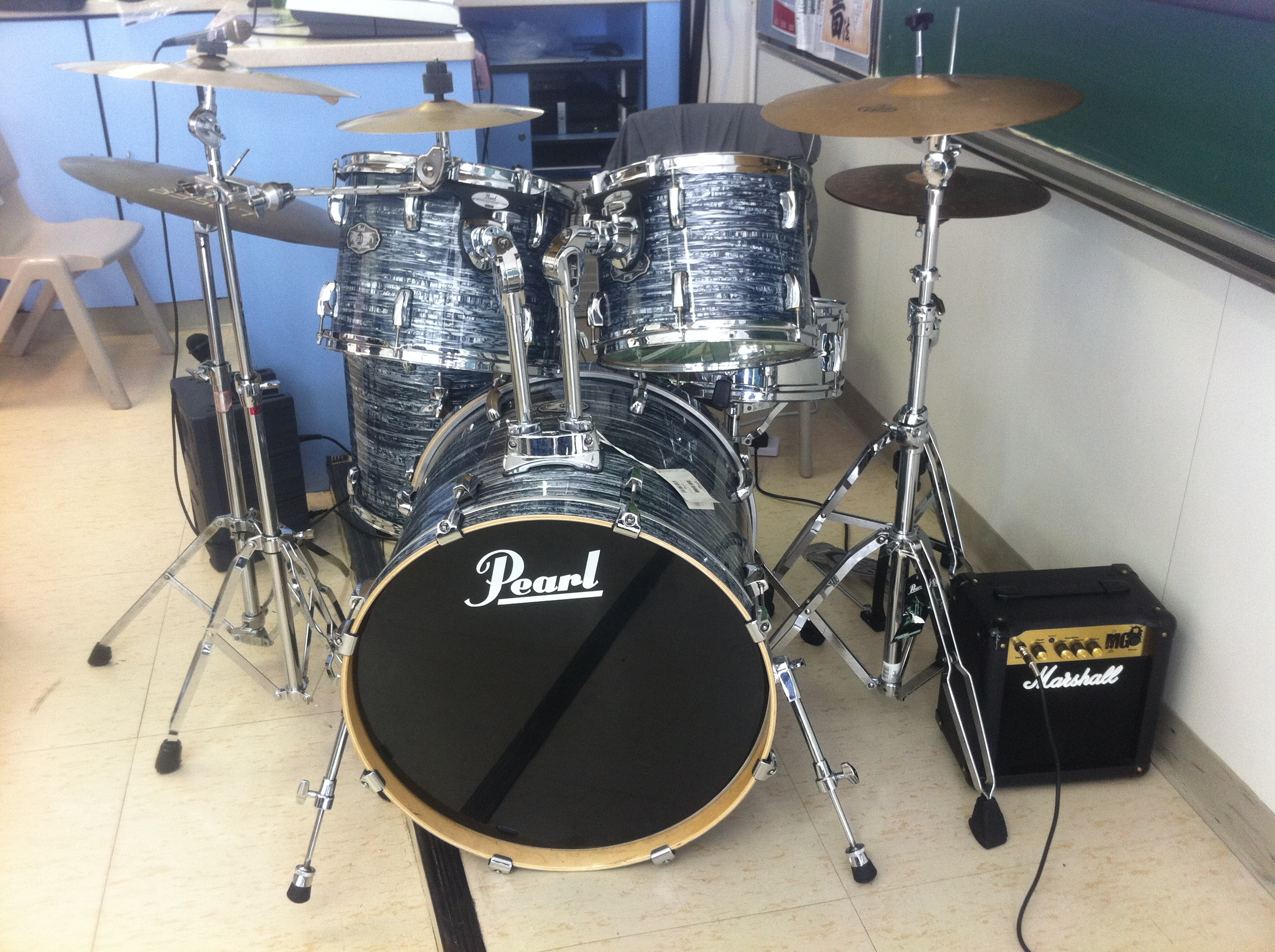 中文（香港）: 香港聖保羅書院 2011年11月 開放日